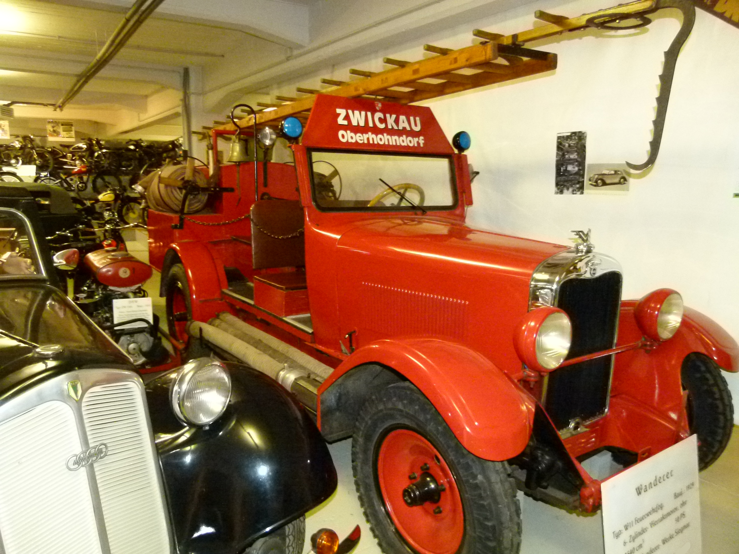 Wanderer W11, 1929, 50 PS, Feuerwehrfahrzeug, Fahrzeugmuseum Chemnitz